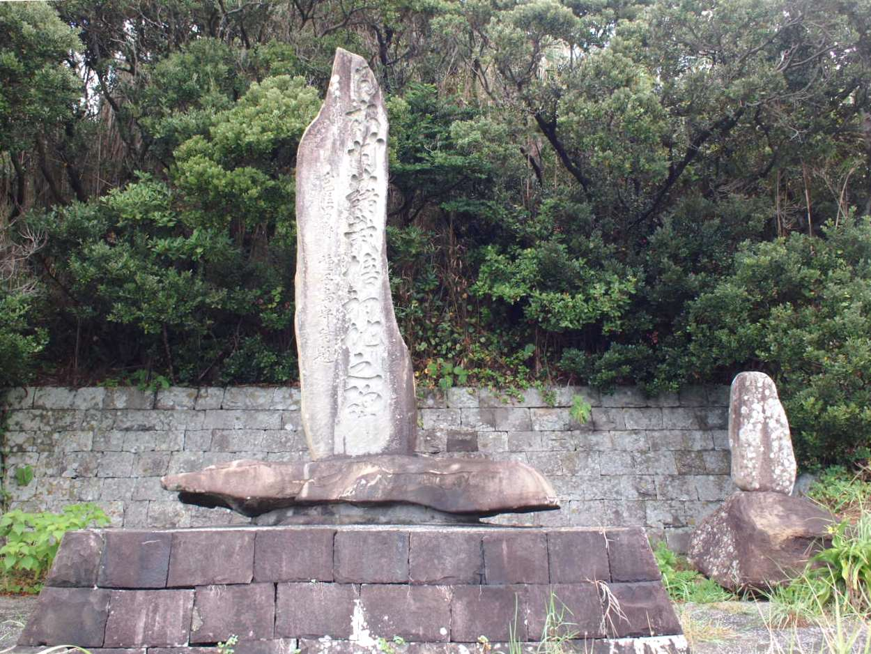 鹿児島県西之表市下石寺神社下に建つ「日本甘藷栽培初地之碑」